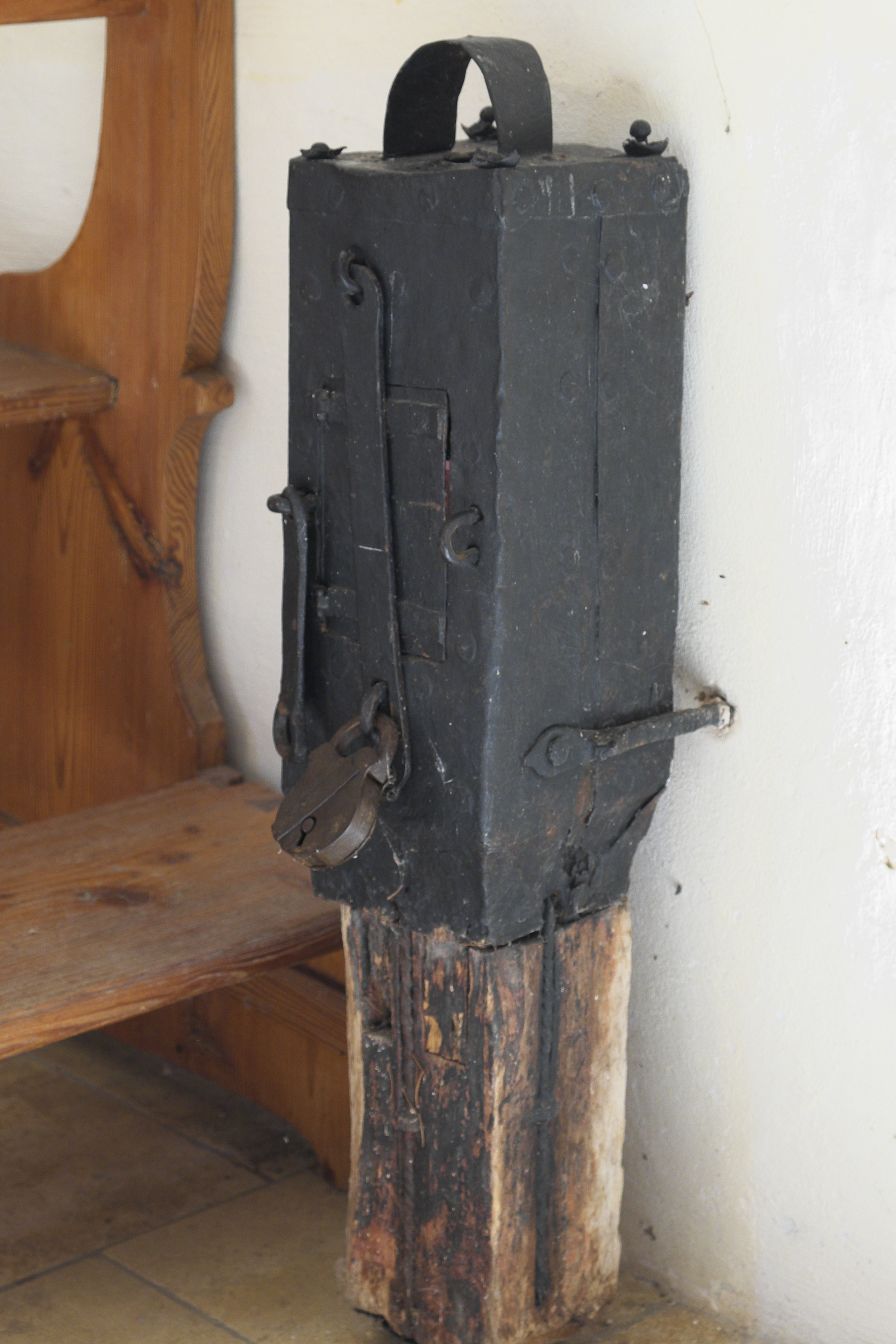 Katholische Kapelle Hl. Dreifaltigkeit in Sickertshofen (Schwabhausen) im Landkreis Dachau (Bayern/Deutschland), Opferstock